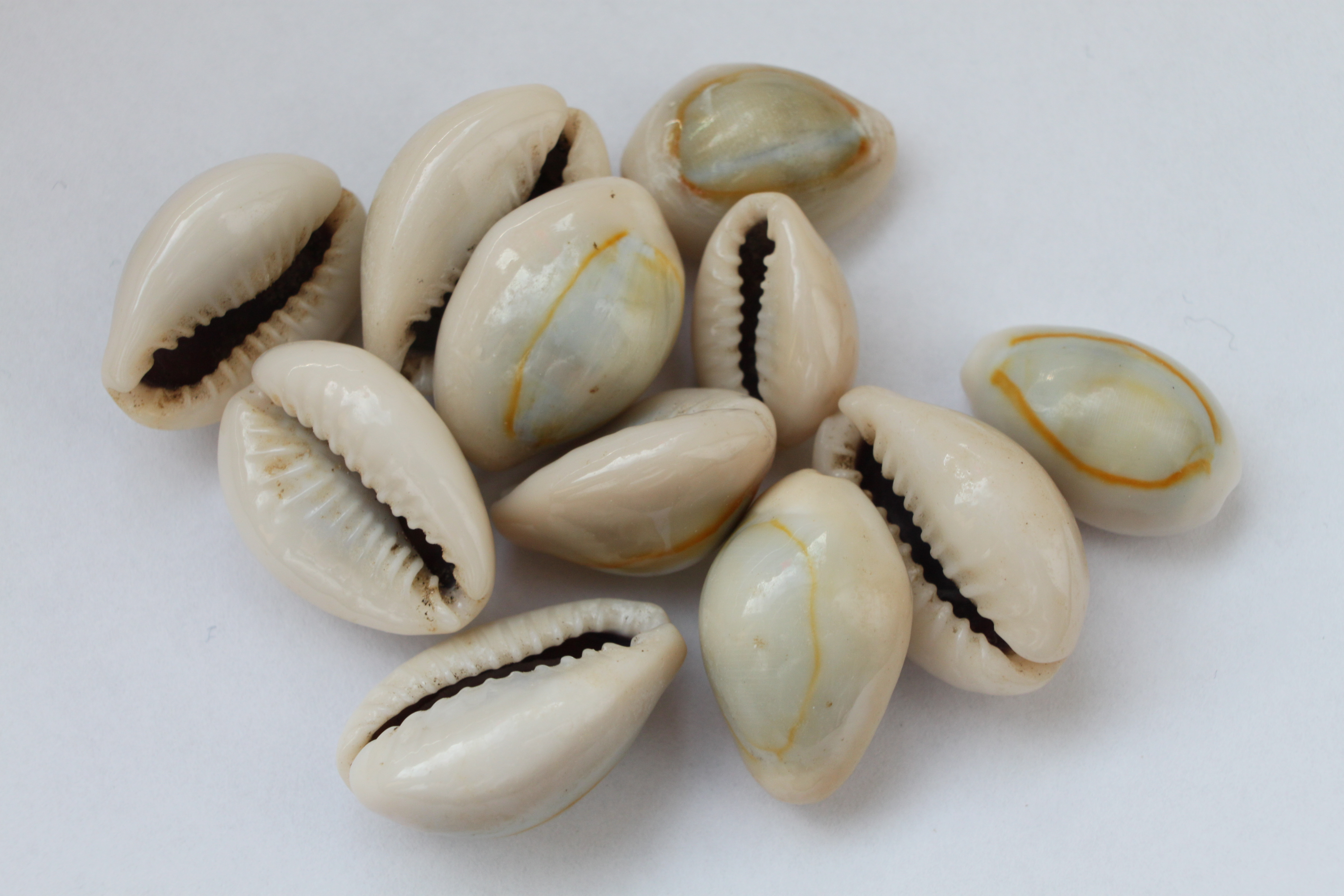 Gehäuse der Monetaria annulus (Ringkauri)), teilweise aufgefräst. Diese wurden neben der Monetaria moneta (Geldkauri) als Kaurigeld verwendet